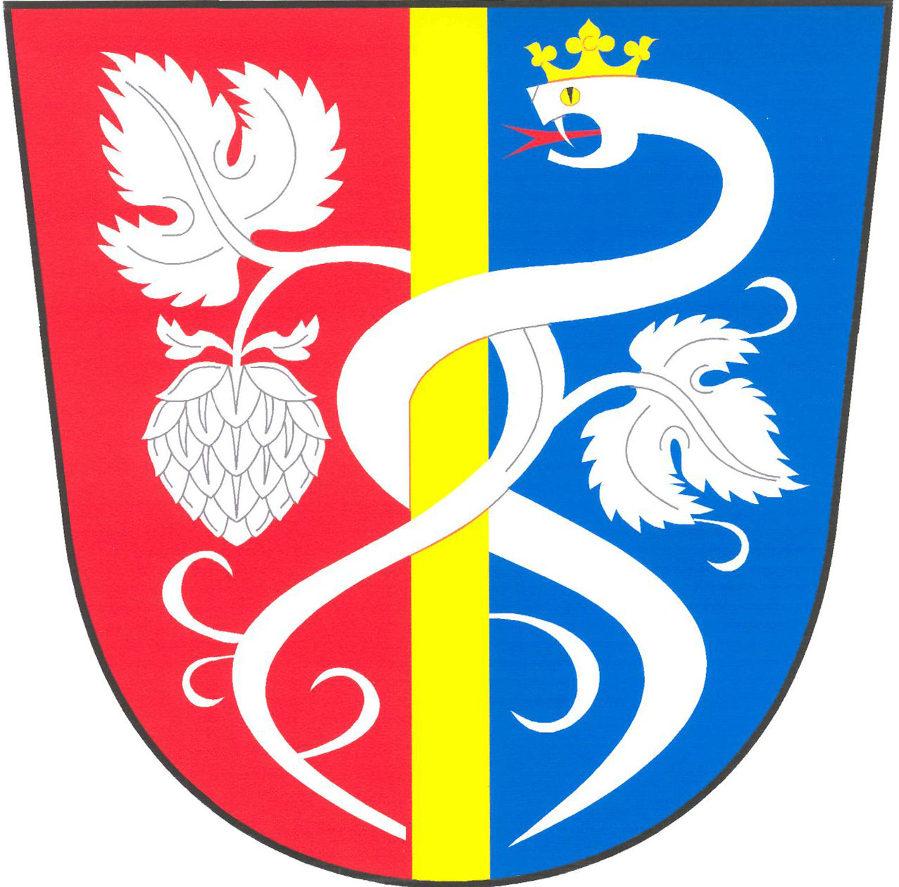 Znak obce Očihov